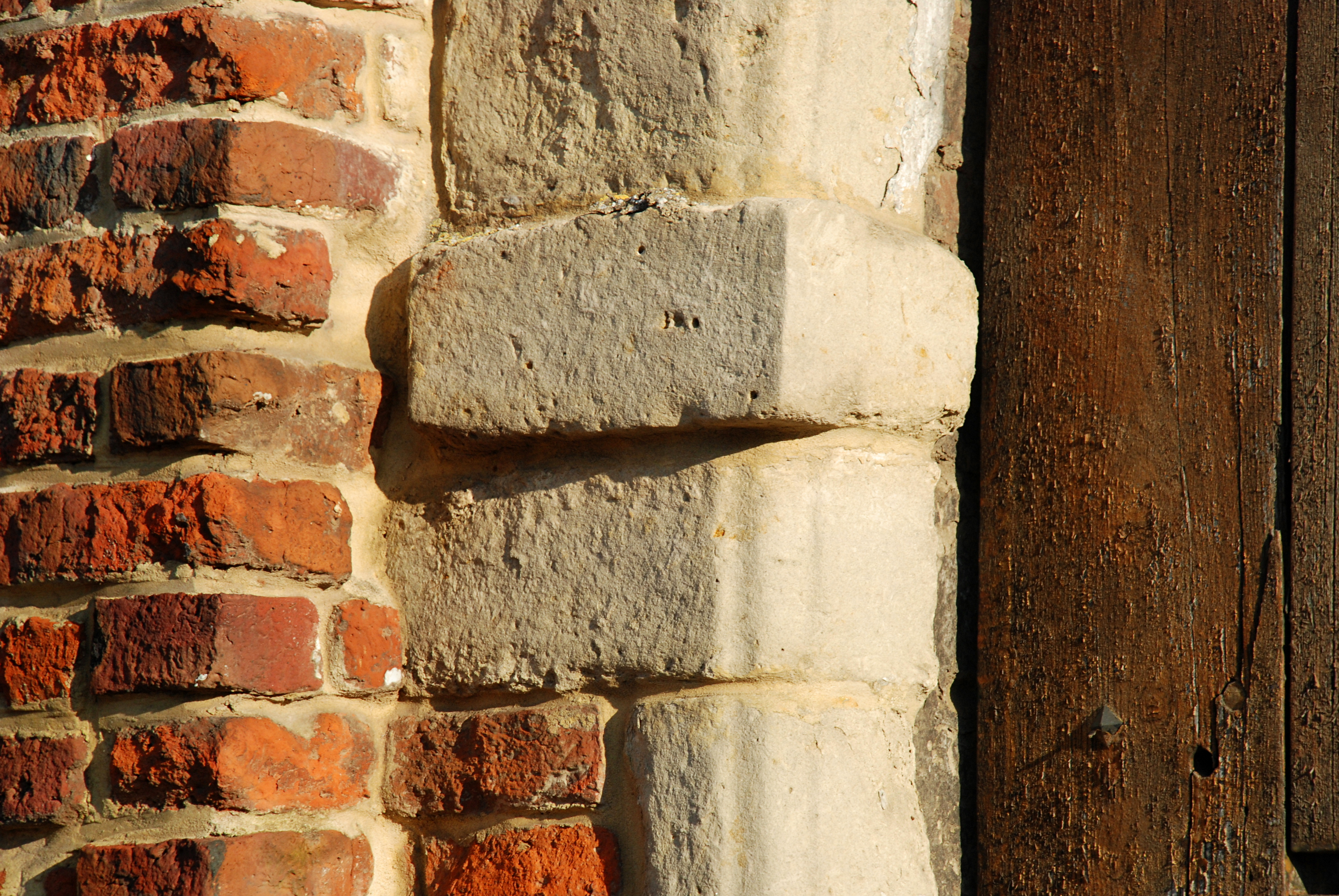 Belgique - Brabant wallon - Ottignies - Manoir de Franquenies